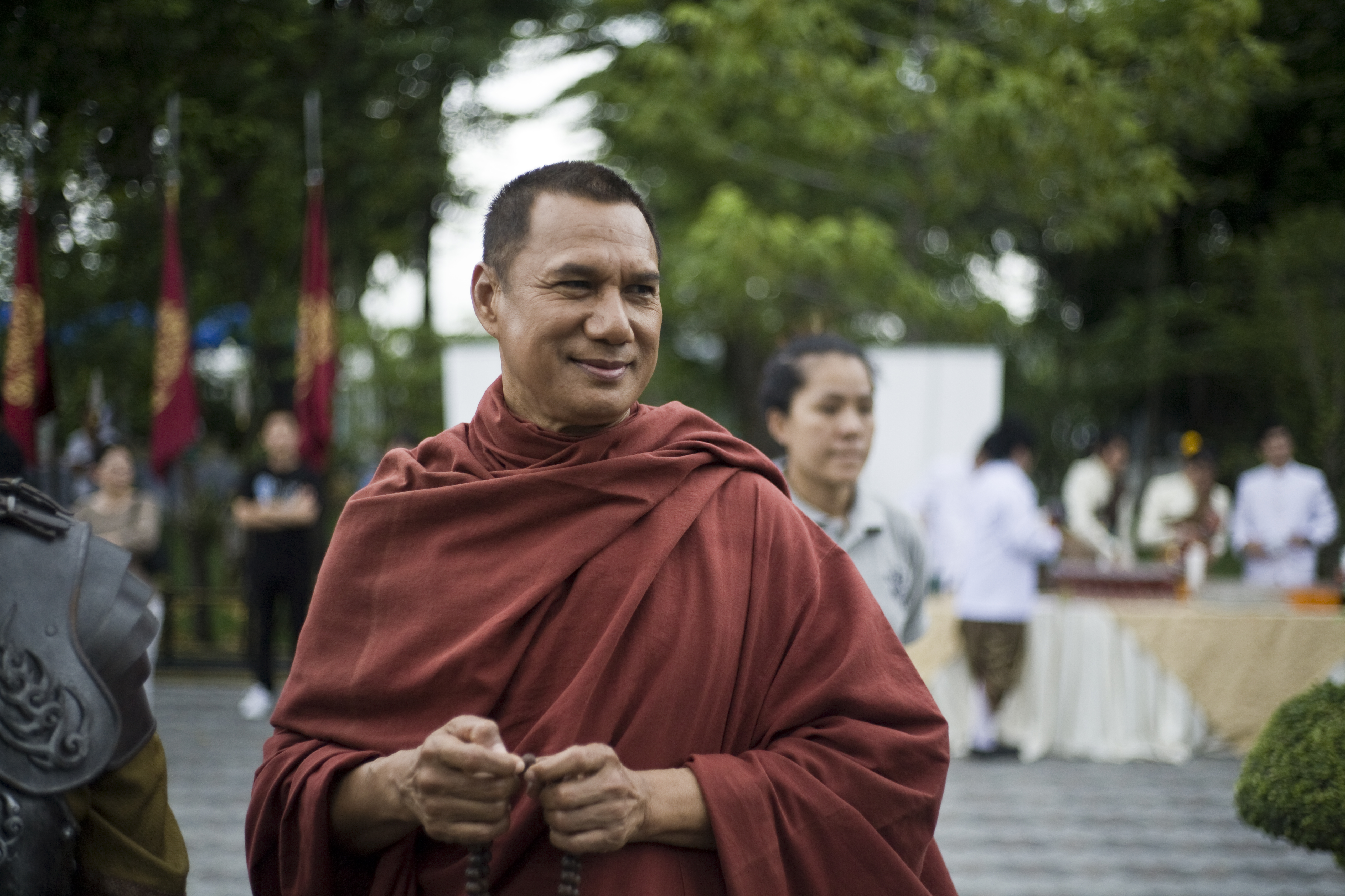 สรพงศ์ ชาตรี / นายกรัฐมนตรี แถลงข่าวรัฐบาลสนับสนุนการสร้างภายนตร์ตำนานสมเด็จพระนเรศวรมหาราช ภาค 3 และ 4 "สงครามยุทธหัตถี" ณ ศูนย์วัฒนธรรมแห่งประเทศไทย 8สิงหาคม2552 (The Official Site of The Prime Minister of Thailand Photo by พีรพัฒน์ วิมลรังครัตน์)